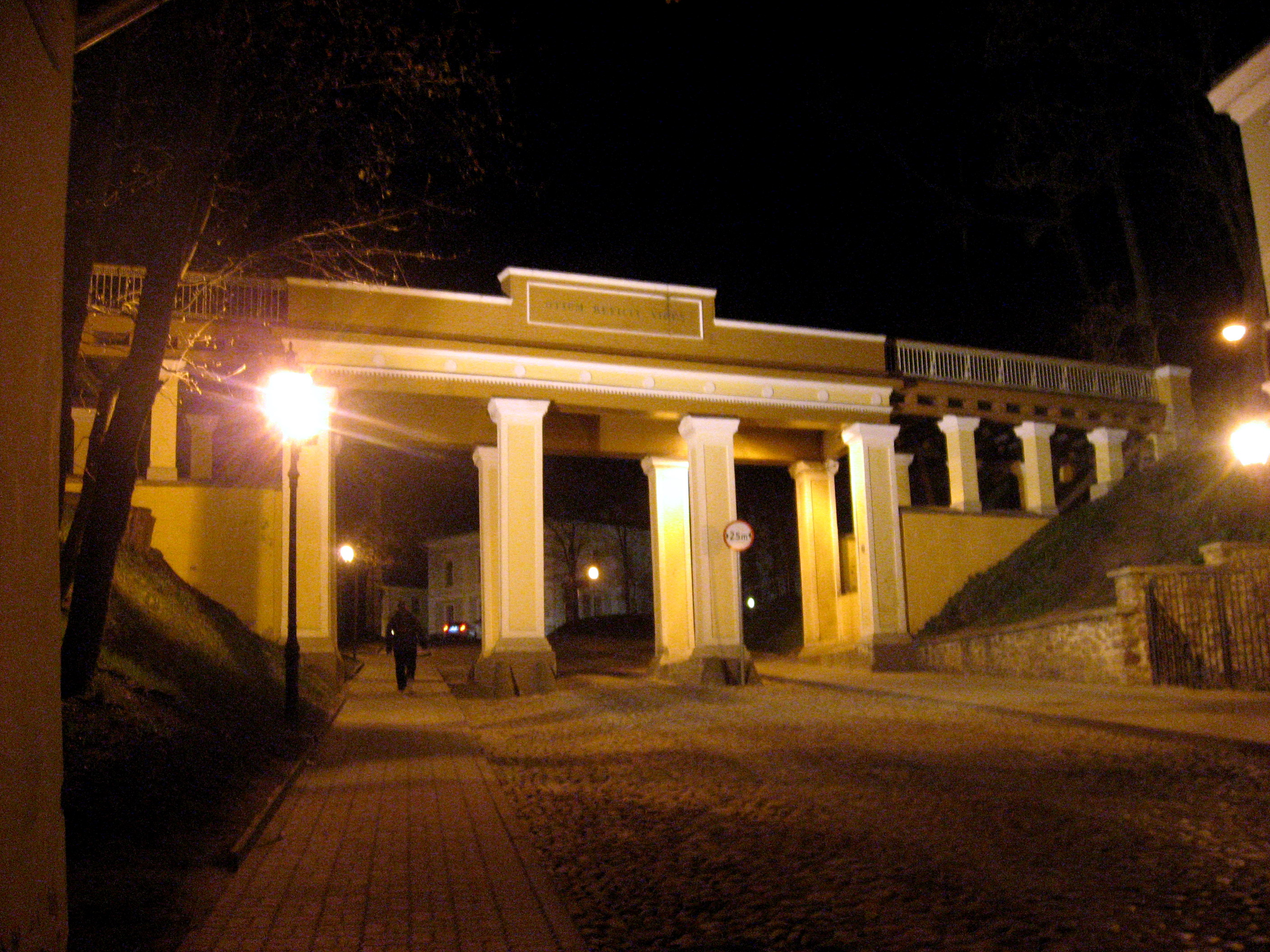 Tartu